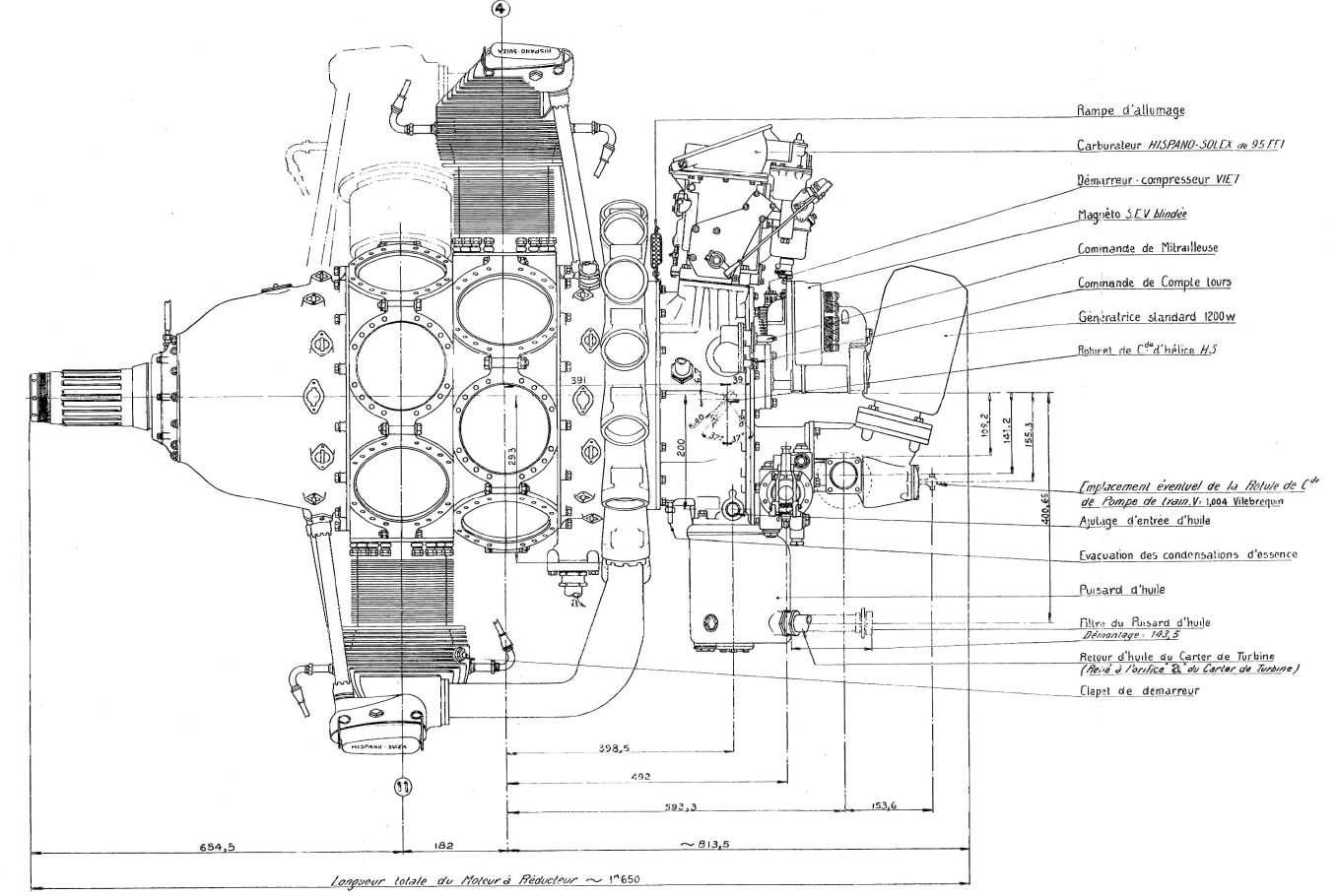 Hispano-Suiza 14AA, vue de côté